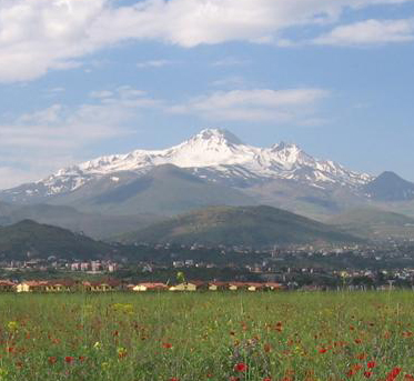 Mount Erciyes